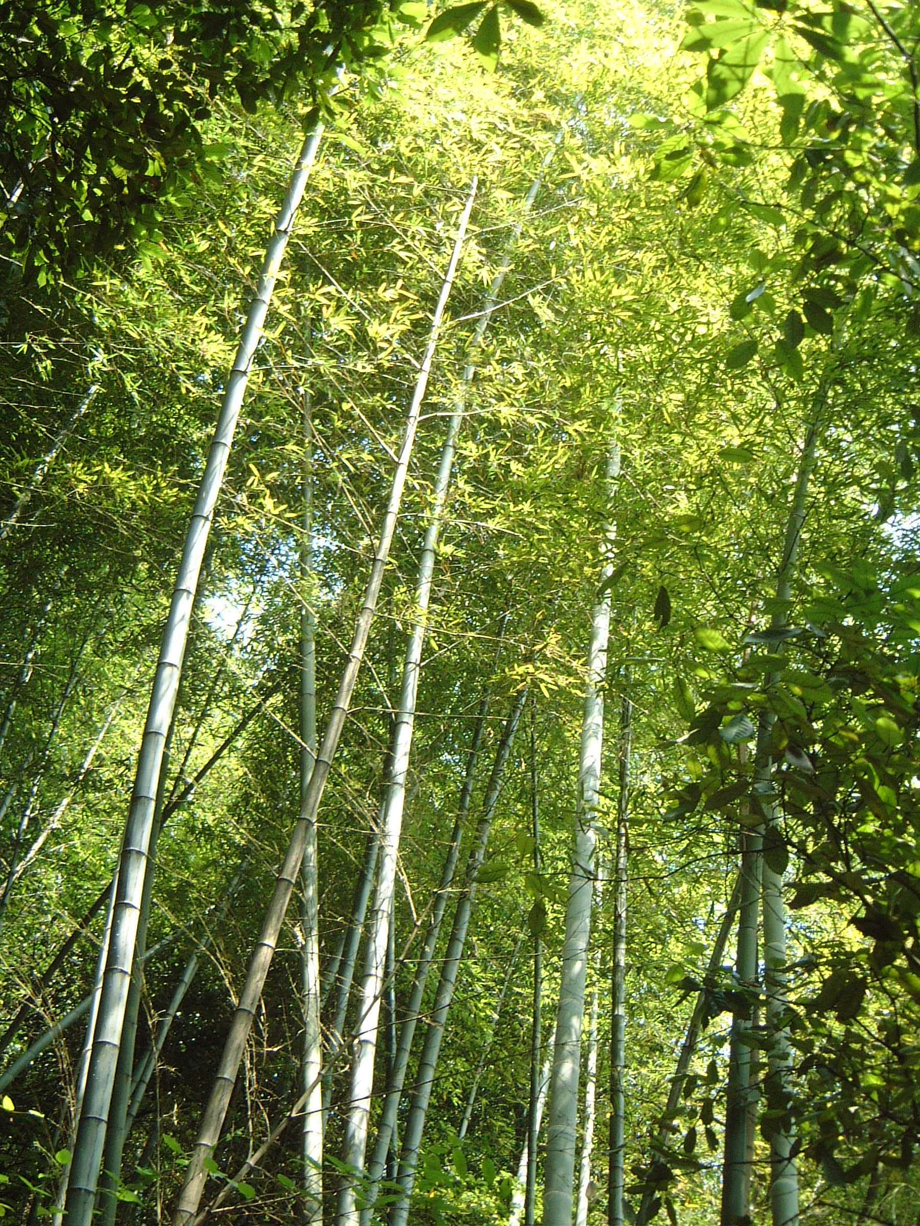 Mogan Mountain - Bamboo Sea